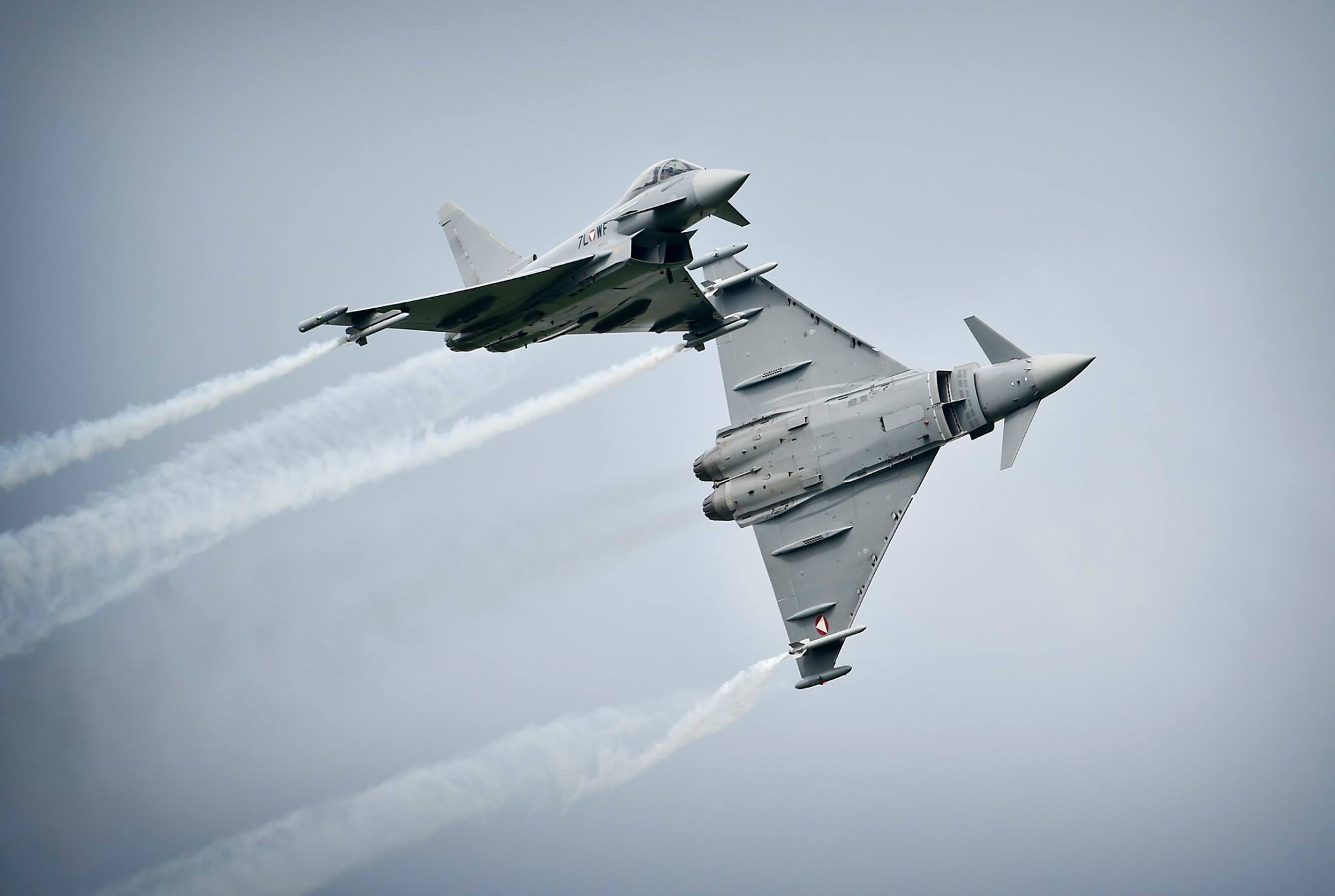 Eurofighter des Bundesheeres.